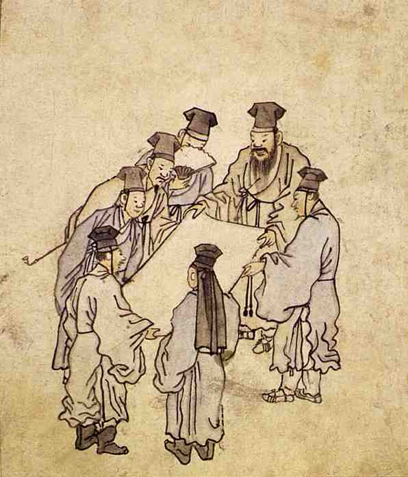 서화감상(審觀), 단원풍속도첩(檀園風俗畵帖)에서 종이에담채, 27cm x 22.7cm, 국립 중앙박물관 소장